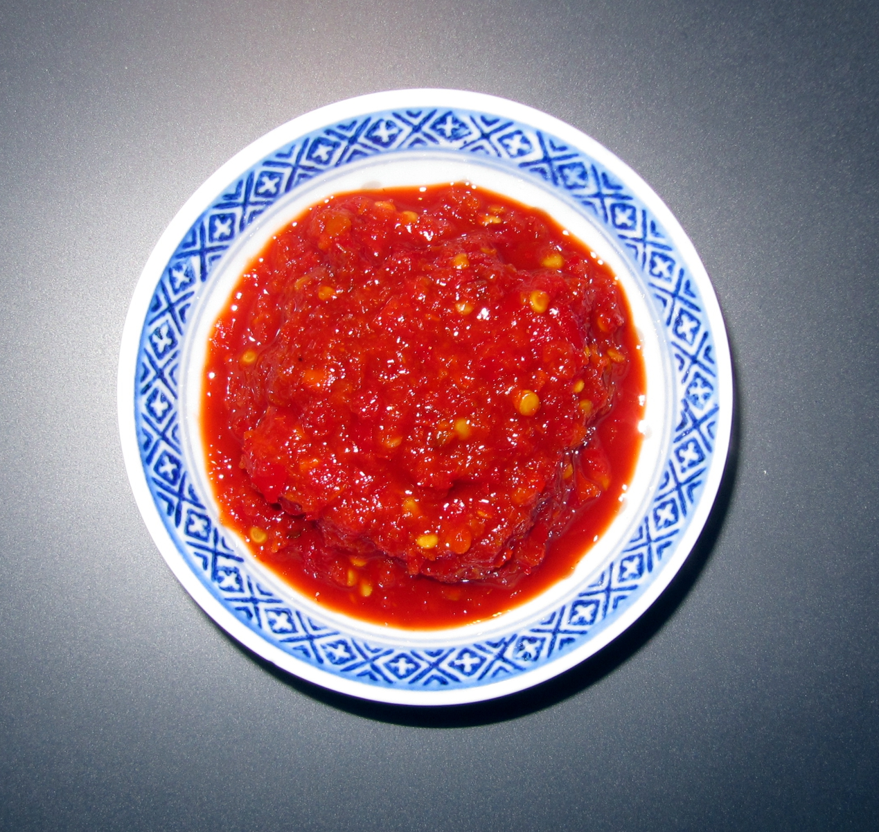 Sambal Oelek in einer Schale